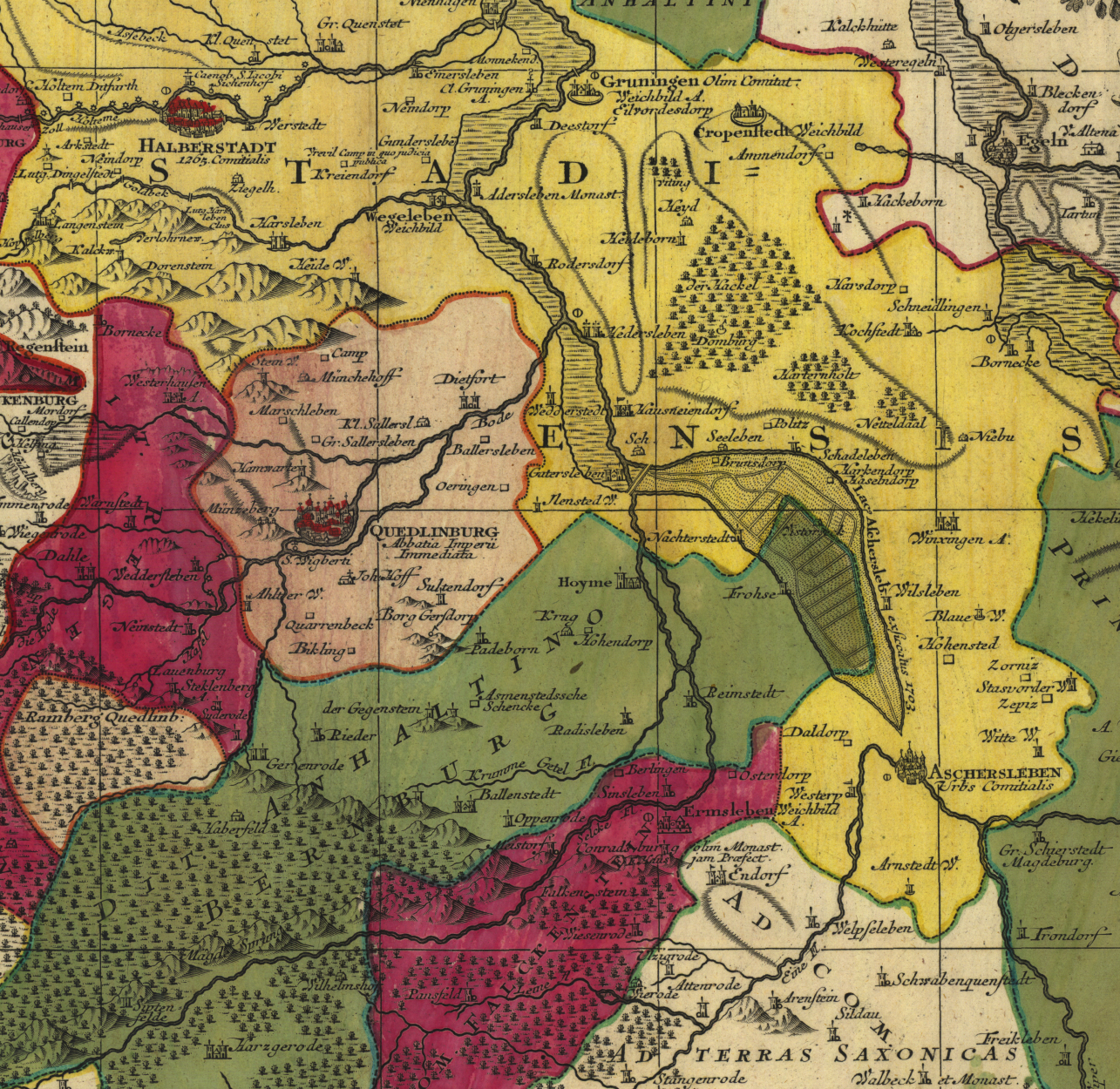 Ausschnitt aus einer Landkarte von 1734